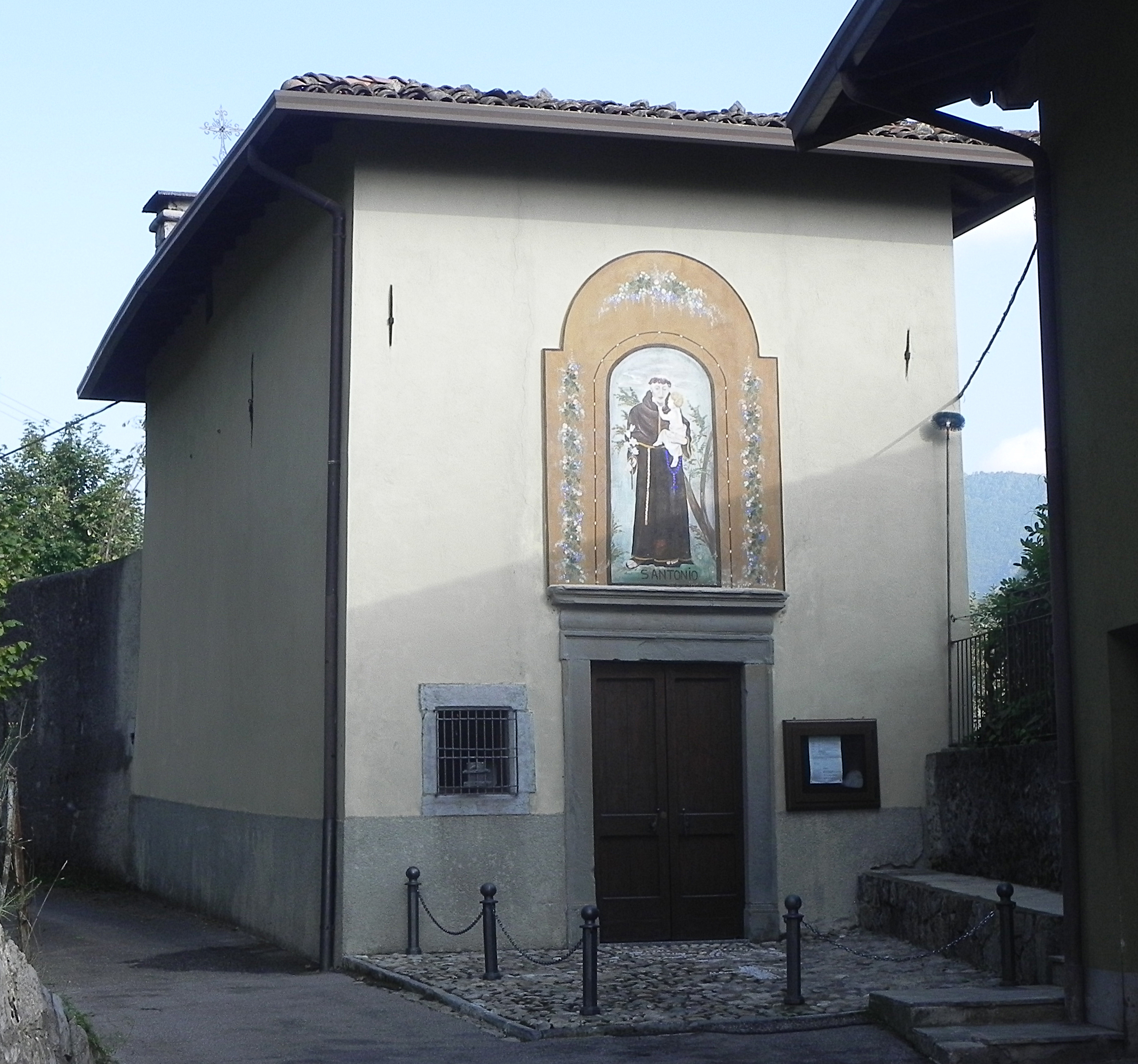 Gorno - Chiesa di Sant' Antonio, XVII secolo